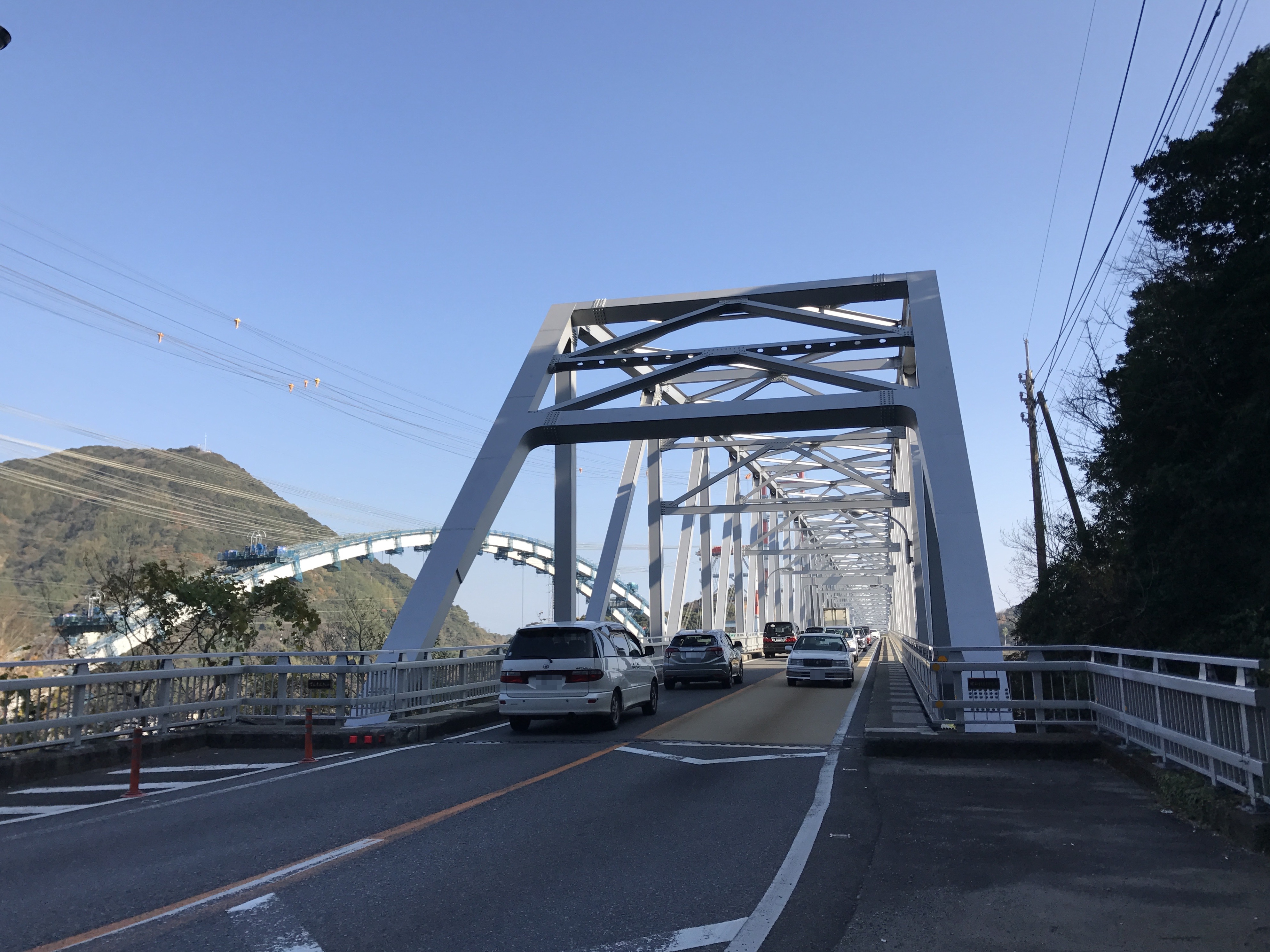 大矢野島側より望む天門橋